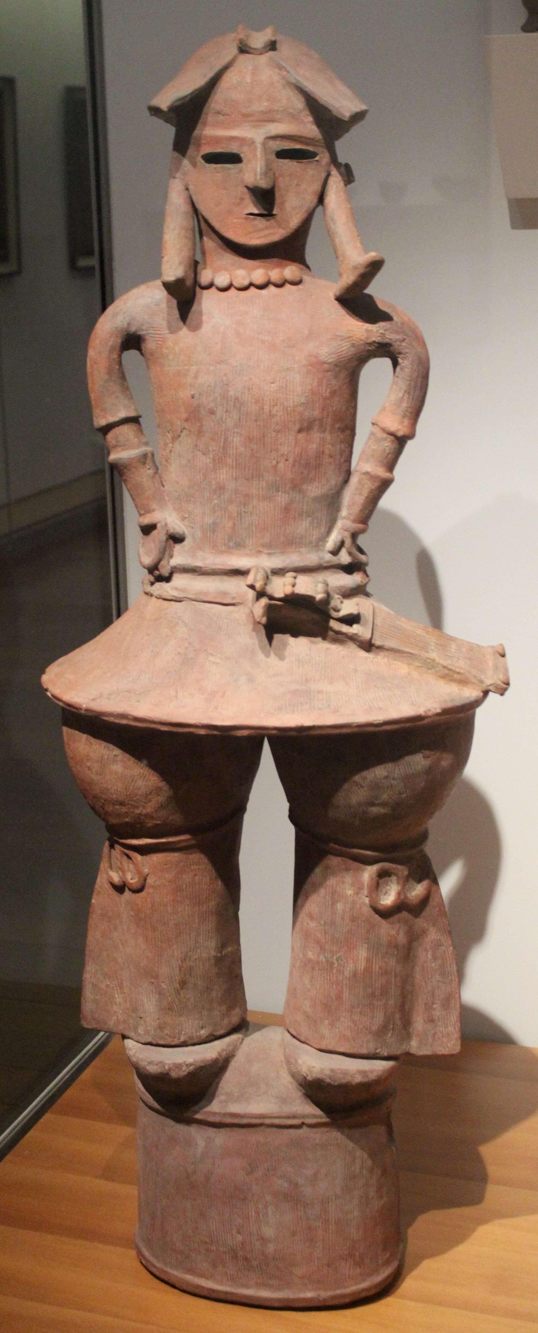 París, Musée Guimet. Haniwa.